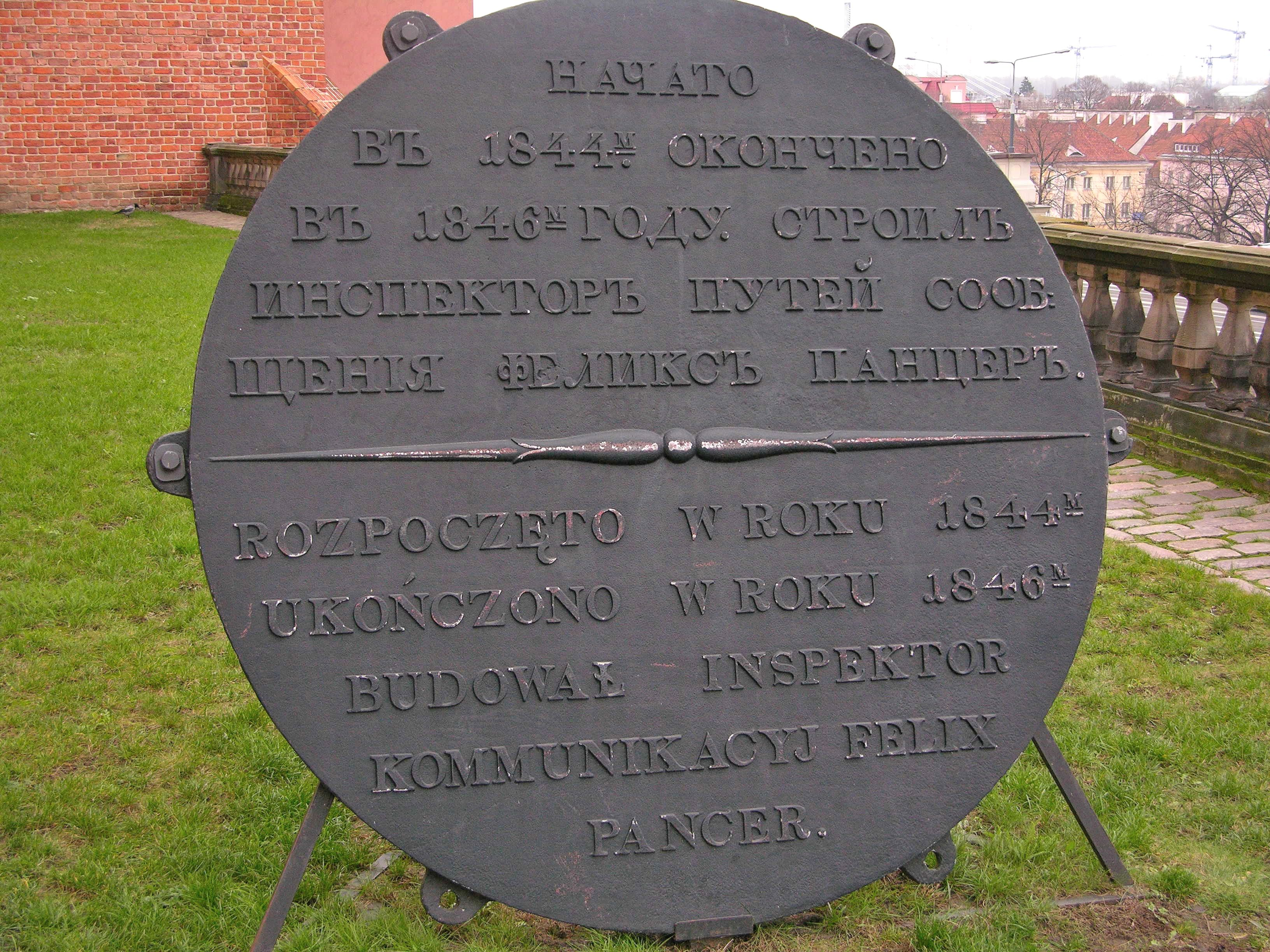 Płyta upamiętniająca Wiadukt Pancera przy Bramie Grodzkiej Zamku Królewskiego w Warszawie